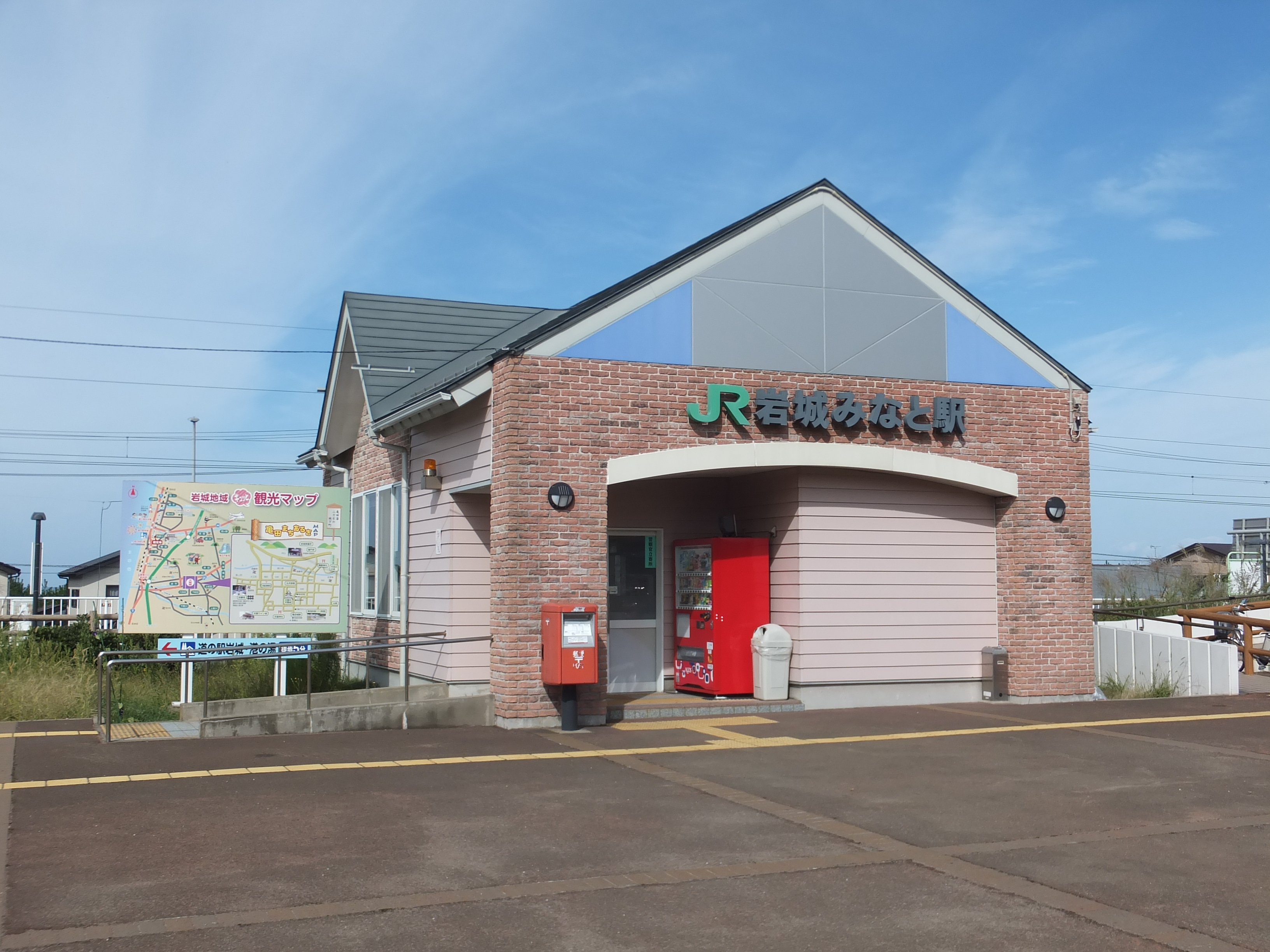 羽越本線 岩城みなと駅（秋田県由利本荘市）